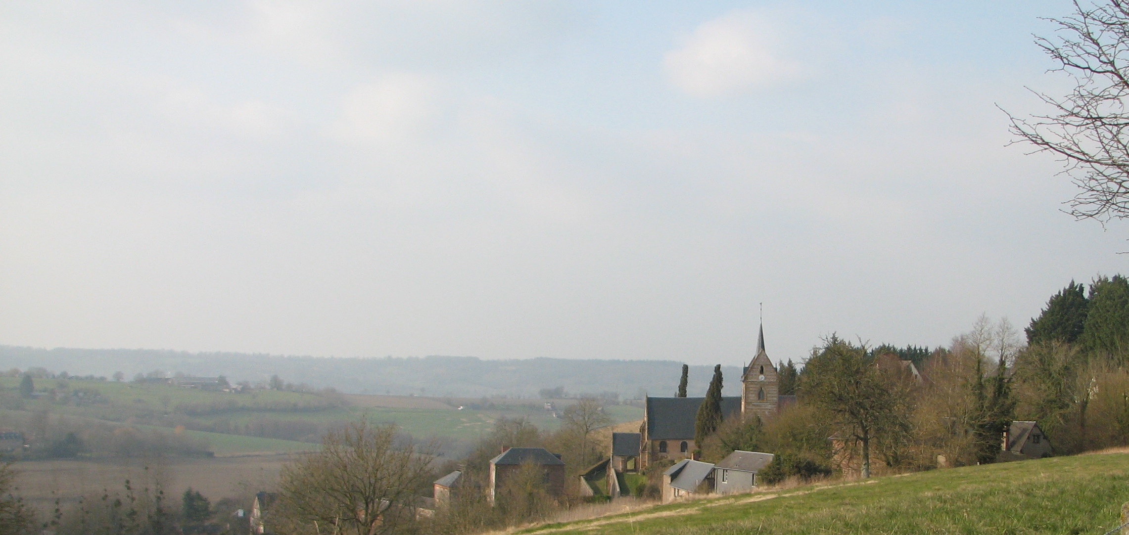 Vue panoramique sur le village et l'église Saint-Michel de Crouttes